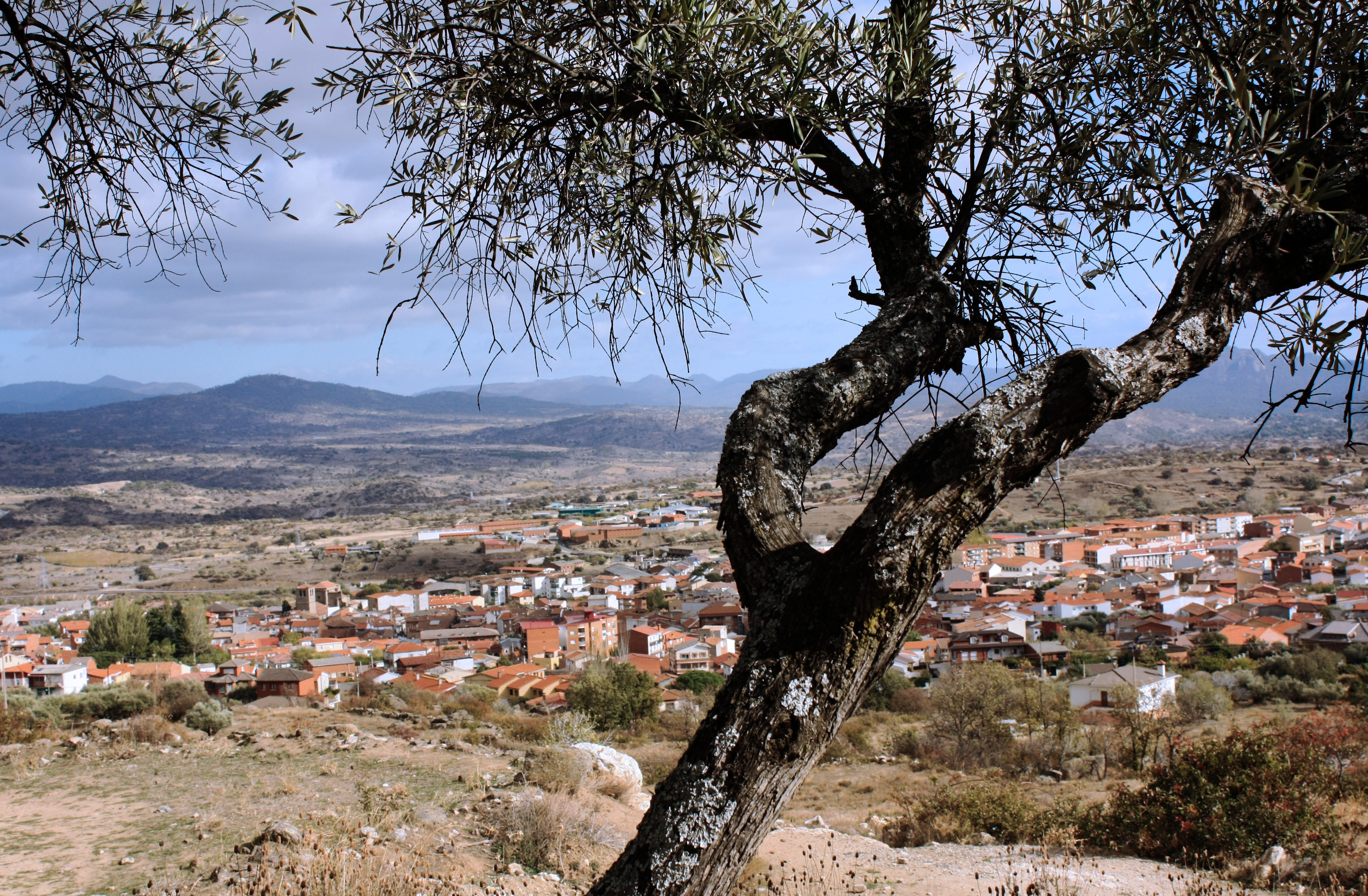 El Tiemblo..